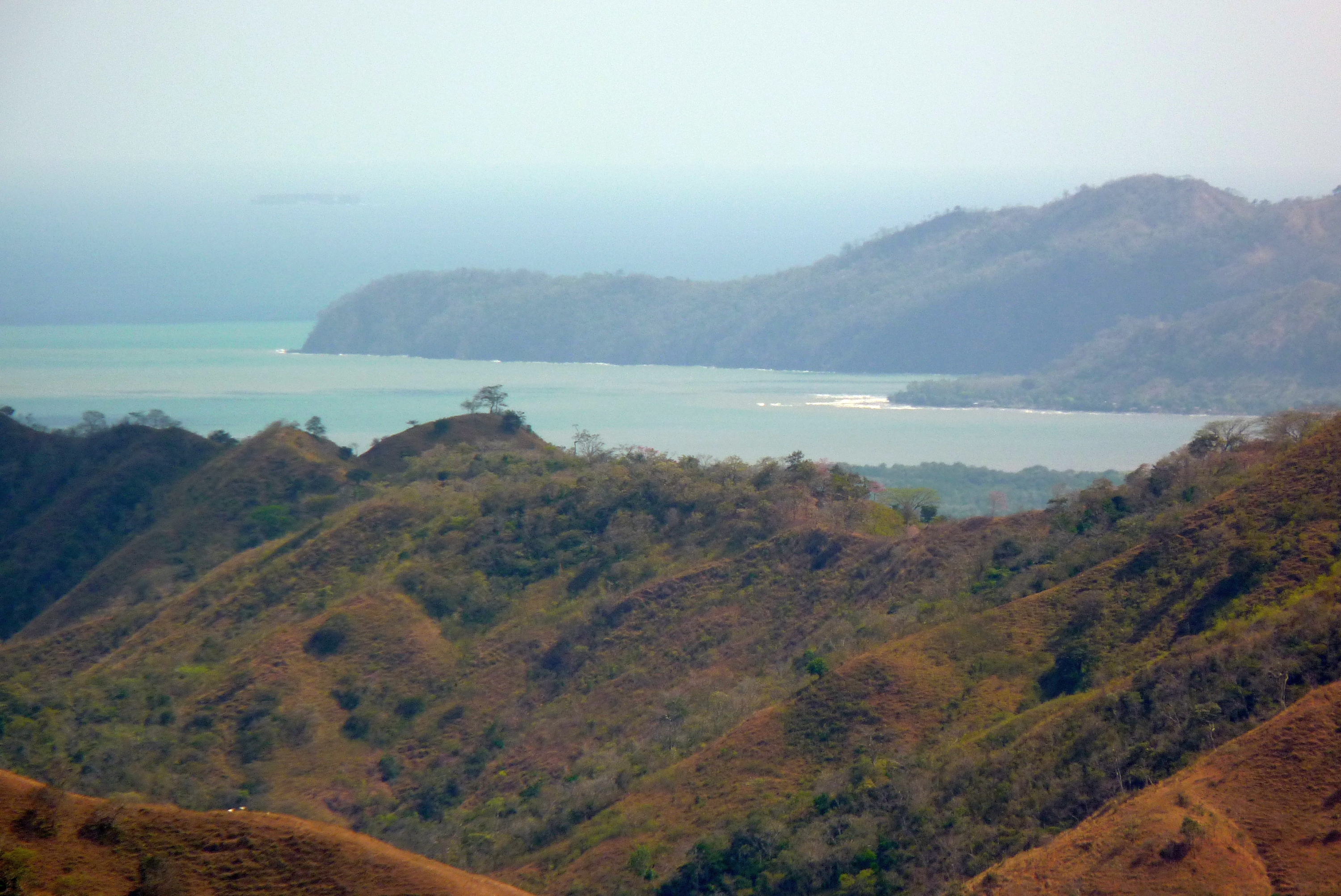 Paisaje natural en Cerro Vigía